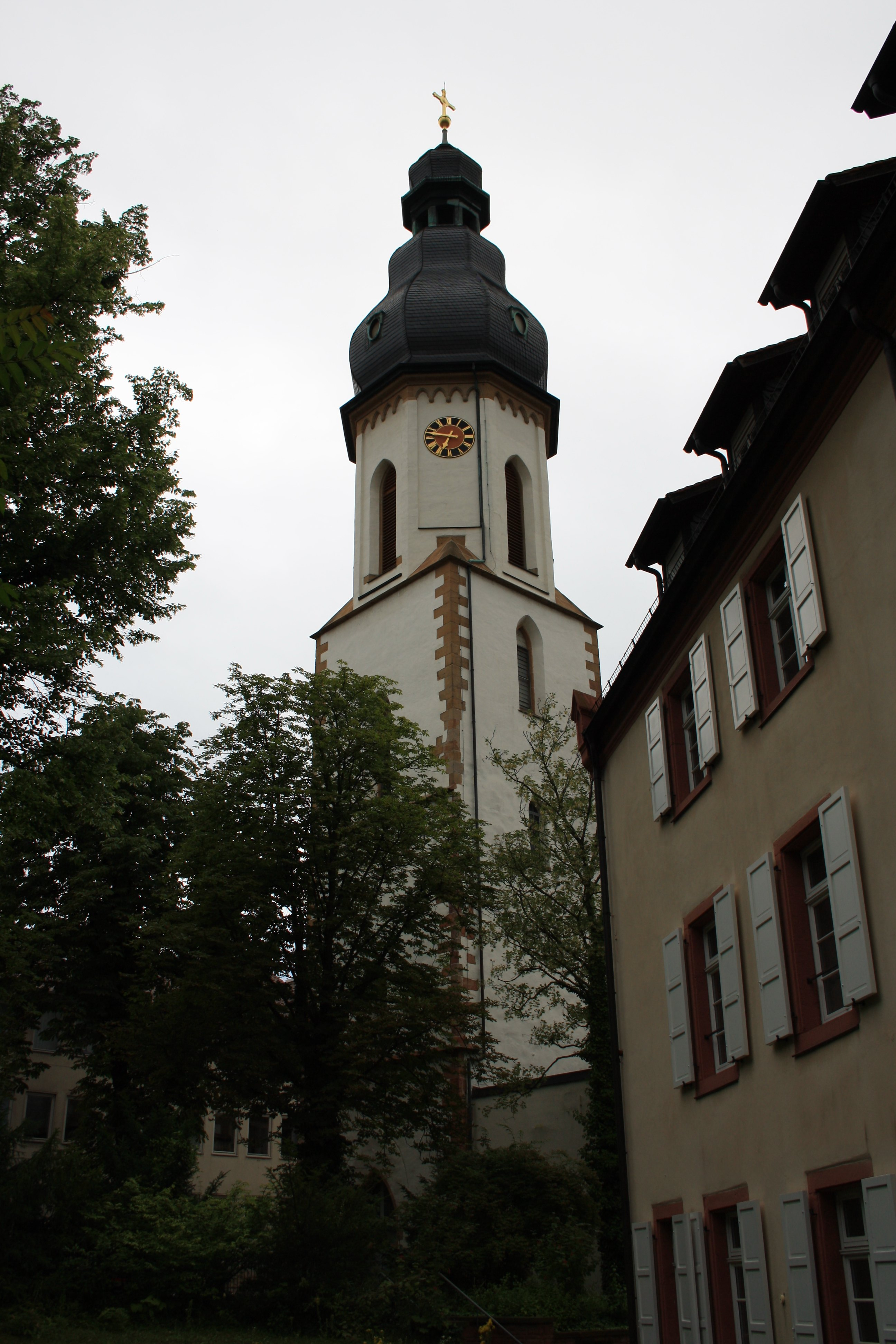 St. Georg (Speyer)